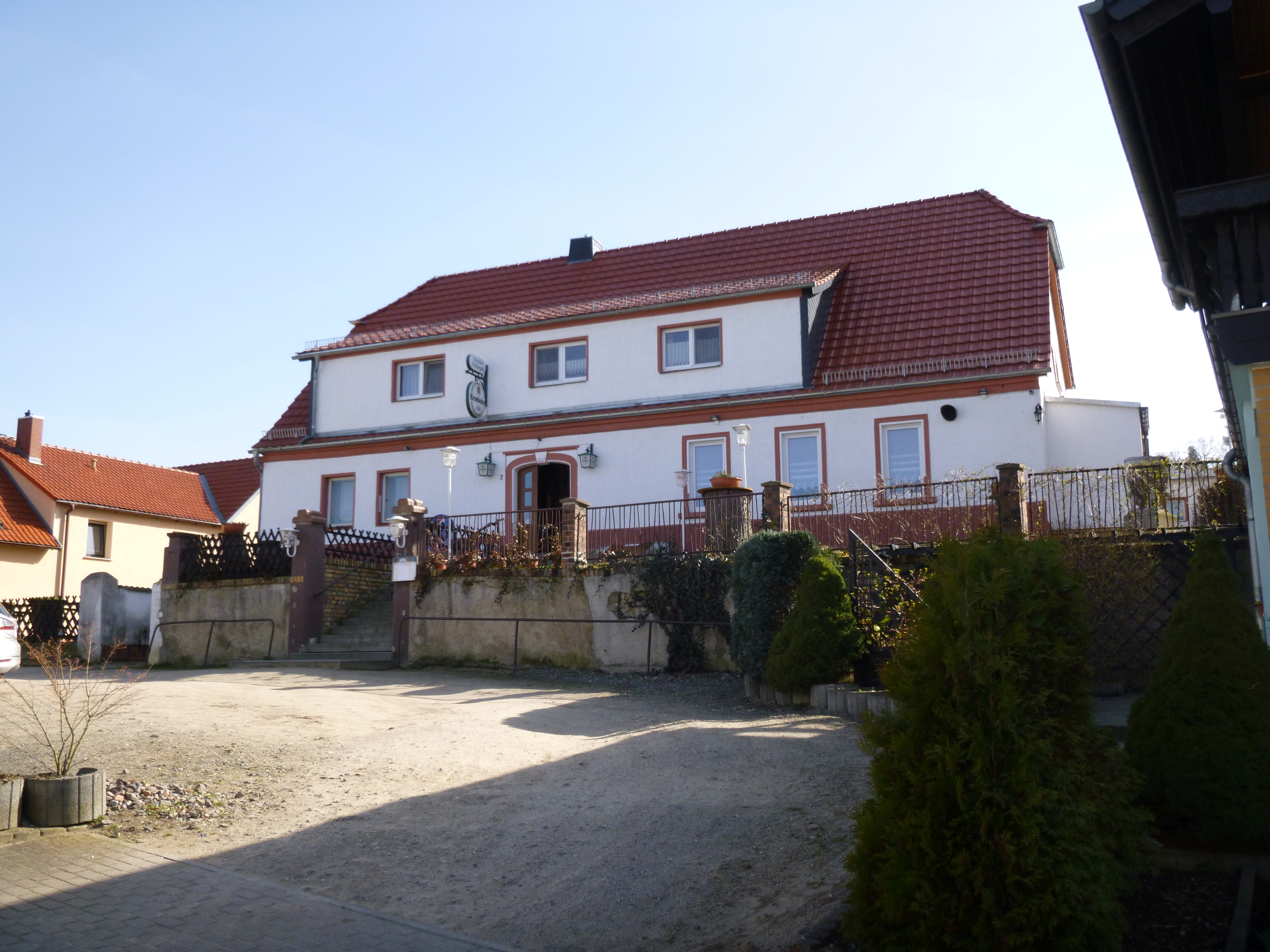 Schlegels Gaststätte in Gröden (Brandenburg)